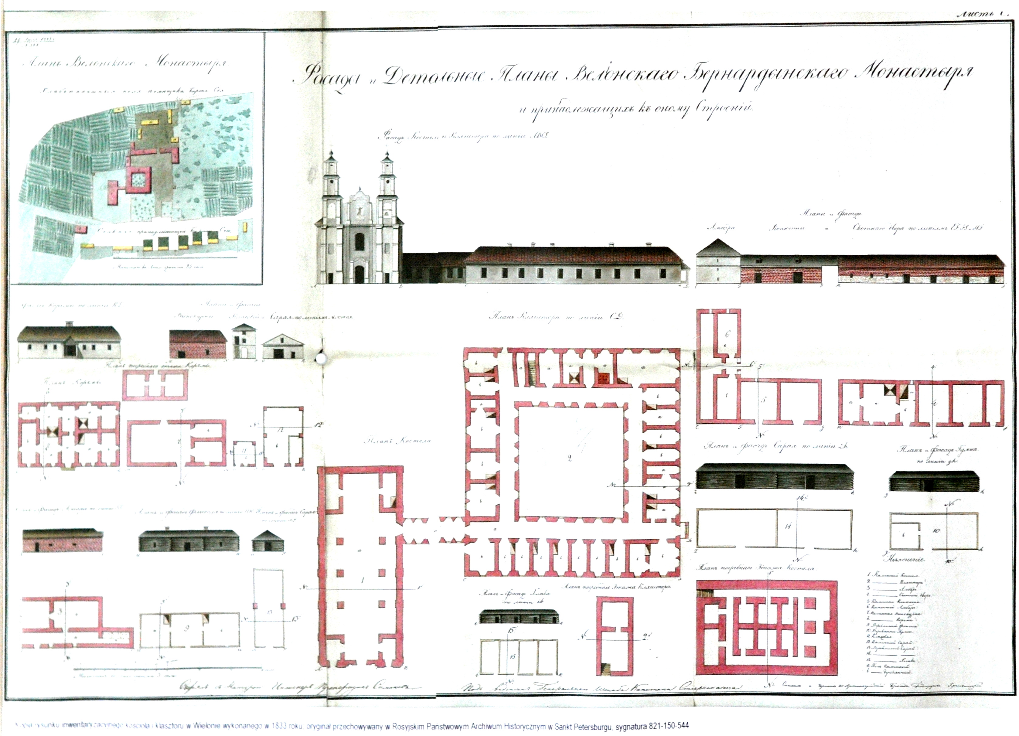 Reprodukcja skanu rysunku inwentaryzacyjnego sprzed roku 1833 kościoła i klasztoru bernardynów (opuścili ten klasztor w 1832) w Wielonach